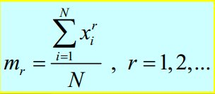 Формула за Мр негрупирани податоци